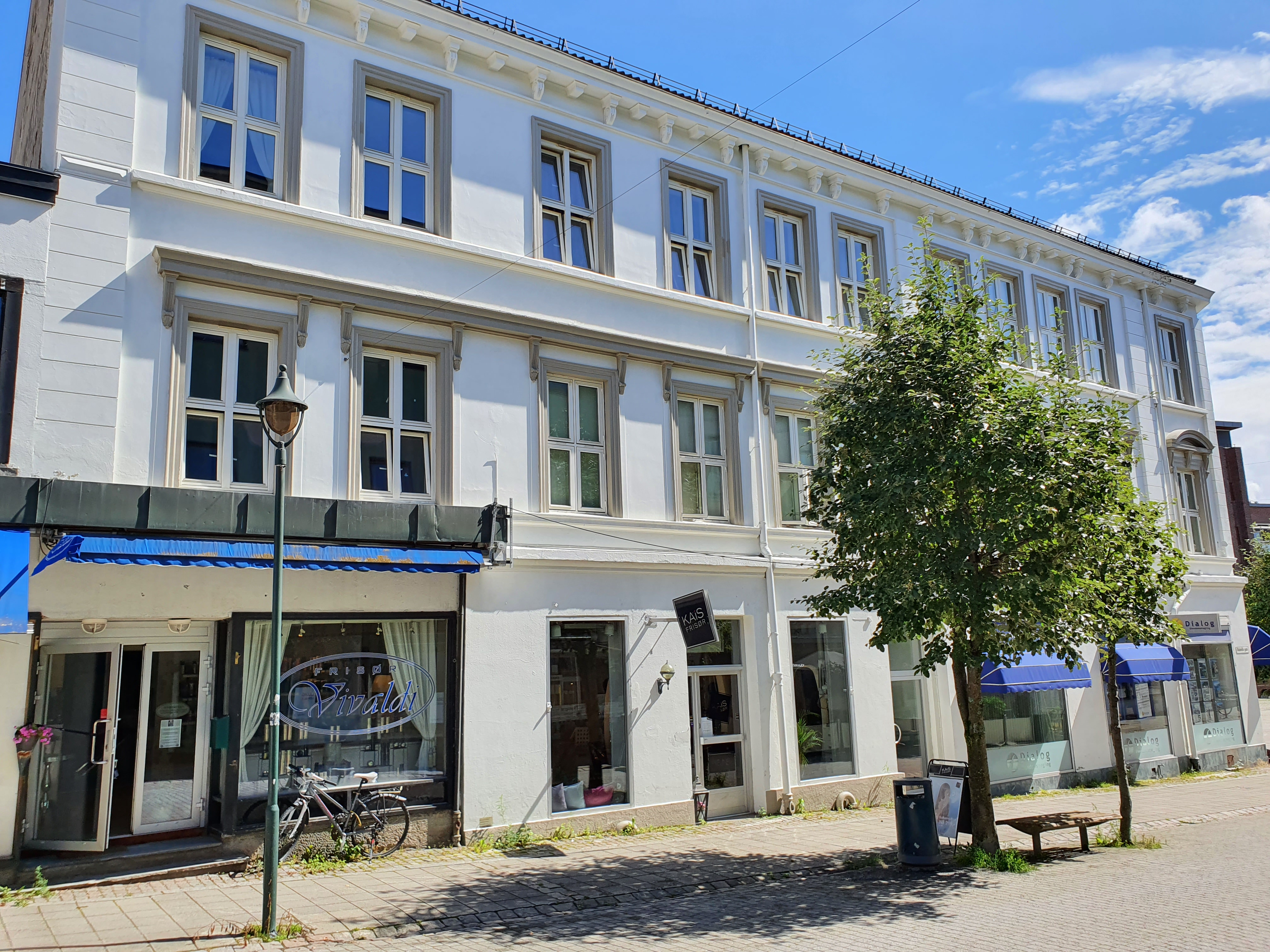 Fasade mot Stabells gate. Denne delen kom til i 1894.